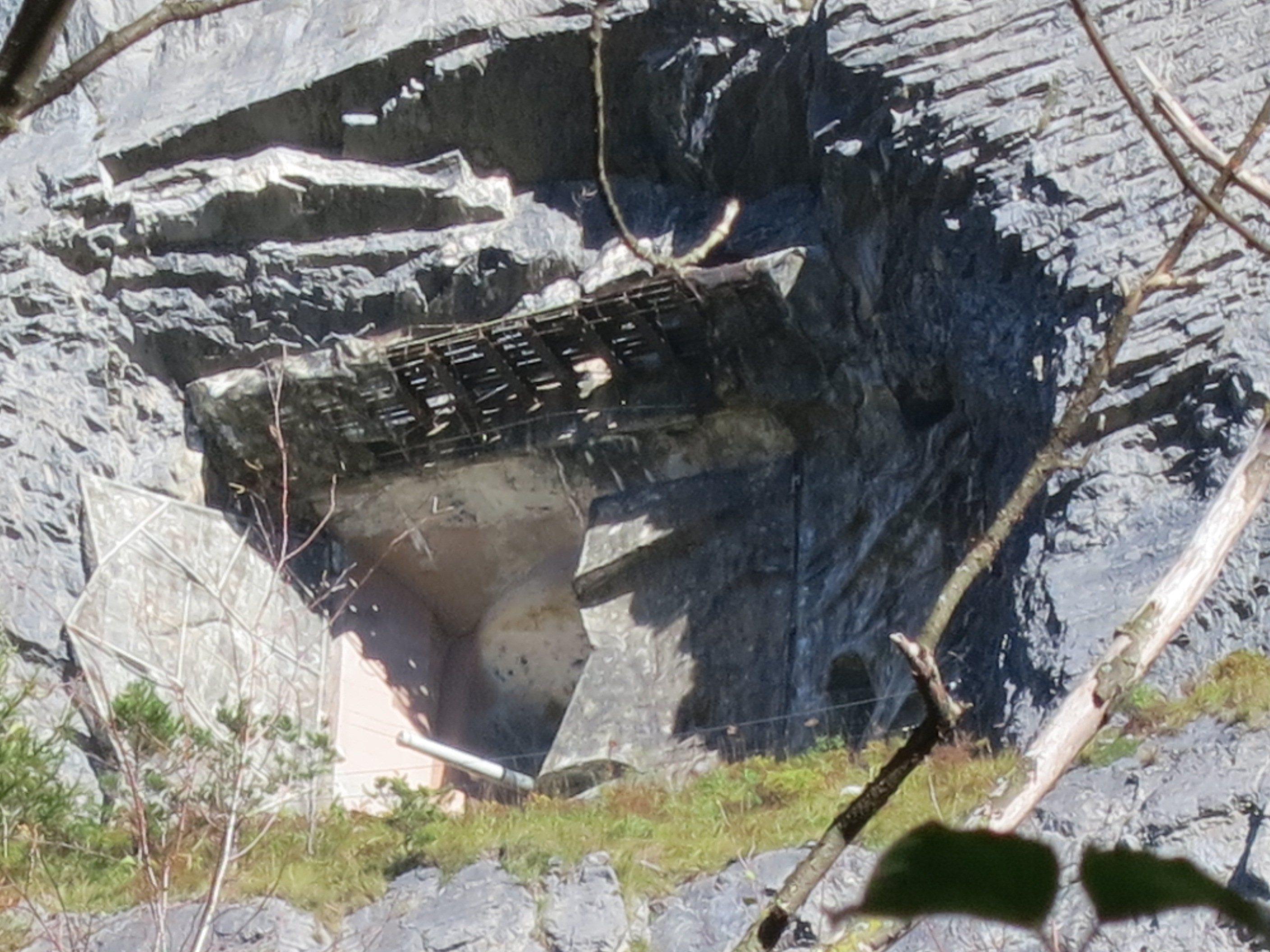 Festung Tschingel, Fläsch GR, Schweiz